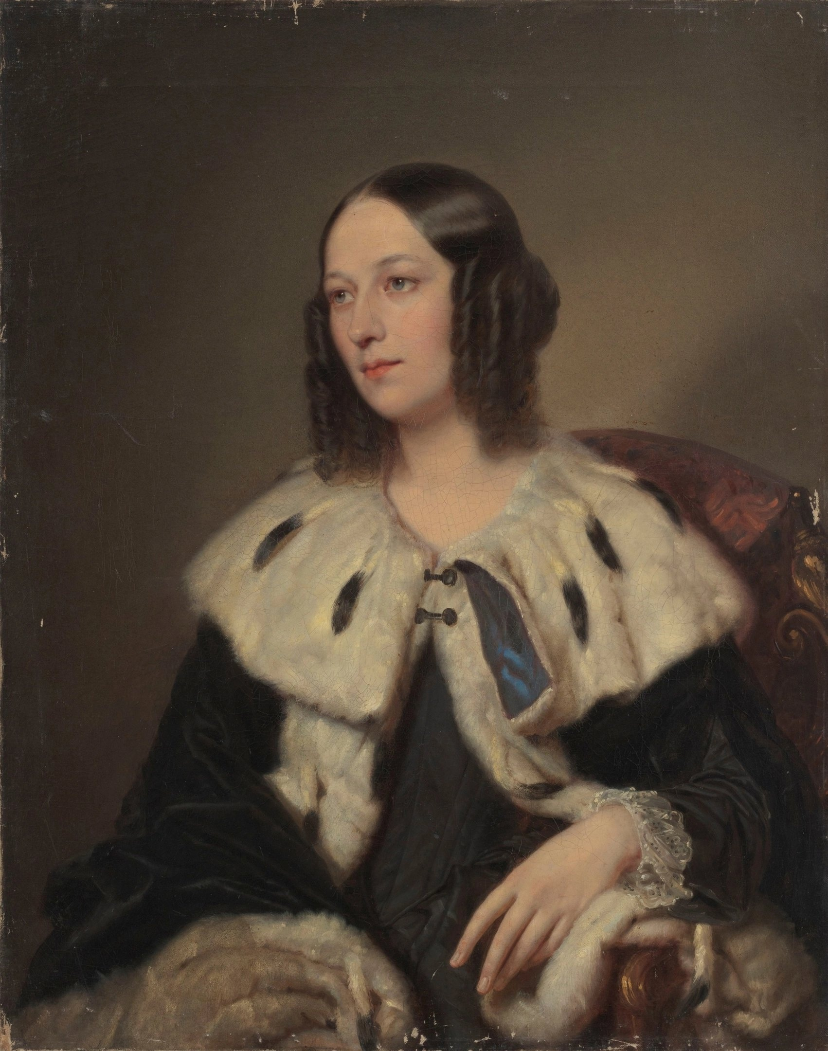 Портрет молодой женщины. Графиня Екатерина Александровна Зубова (1811-1843), ур. Оболенская.